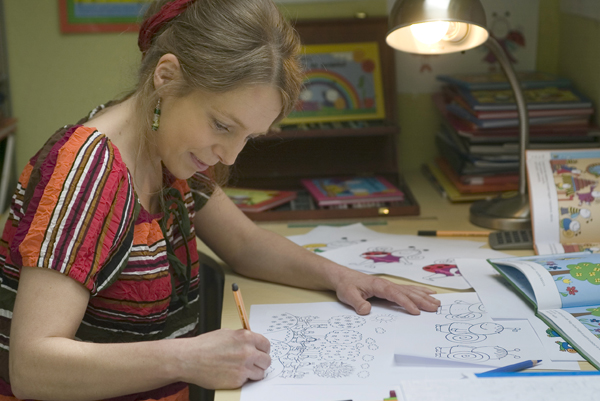 Bartos Erika rajzolás közben